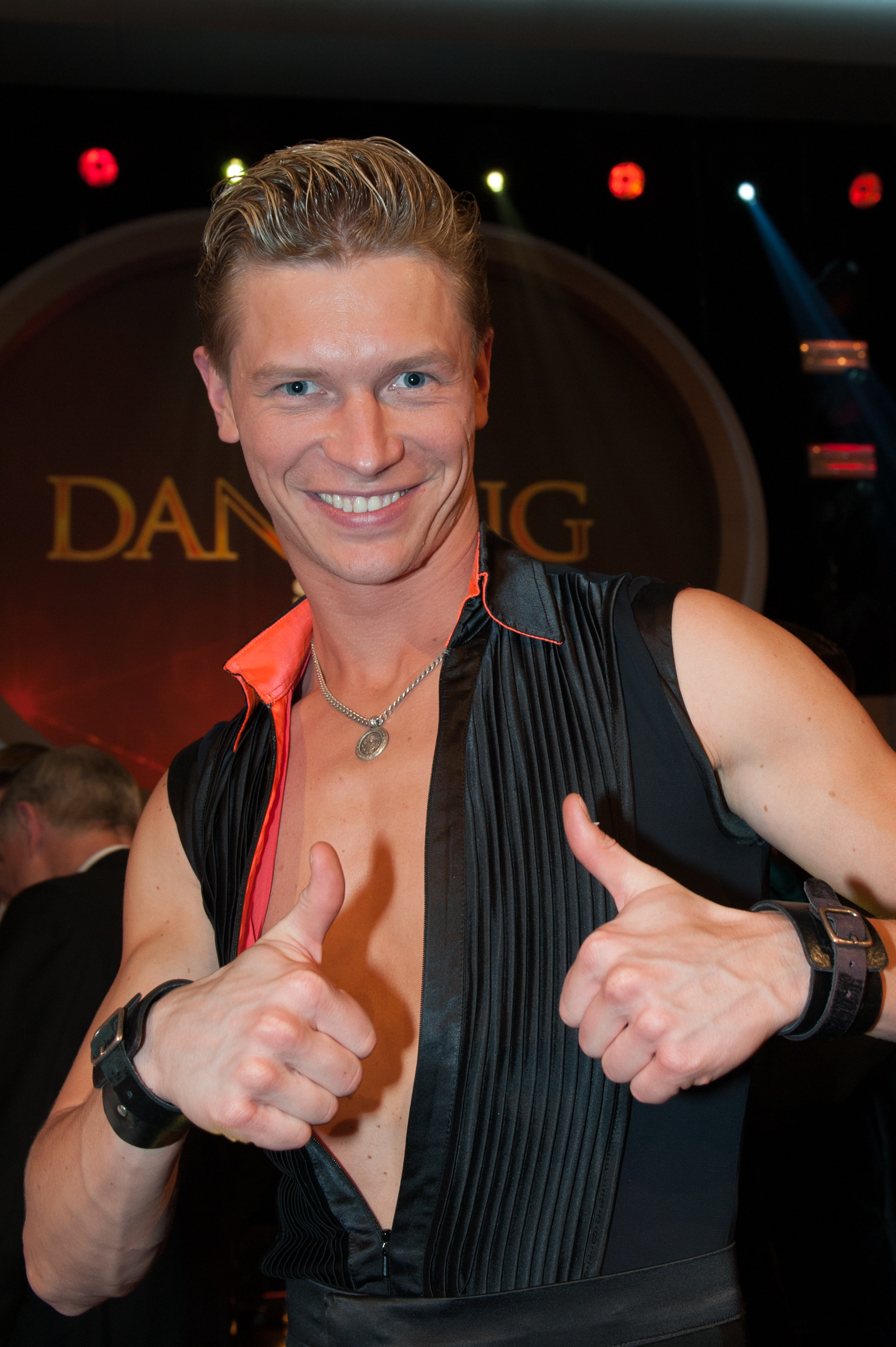 ORF Dancing Stars - Erste Entscheidung am 18. März 2016: Paul Lorenz